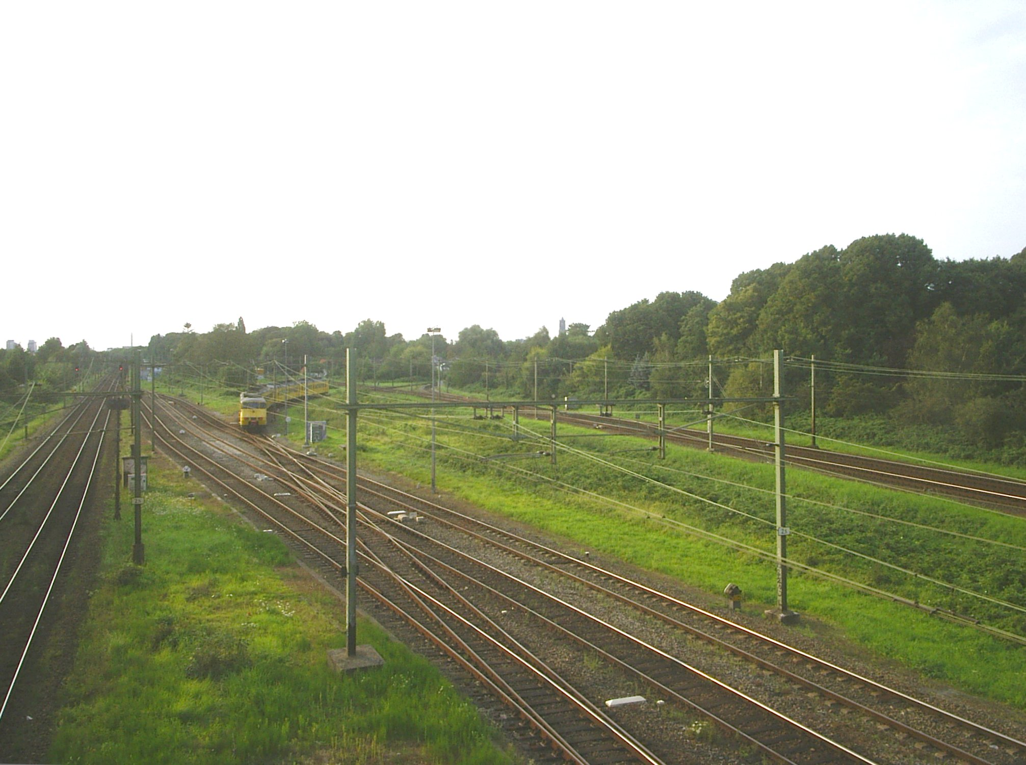 De plaats van het voormalige station Lunetten